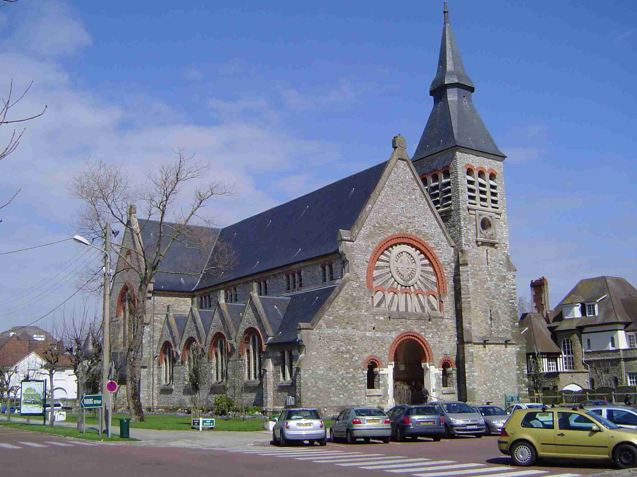 Photo prise par moi-même le 17 avril 2006